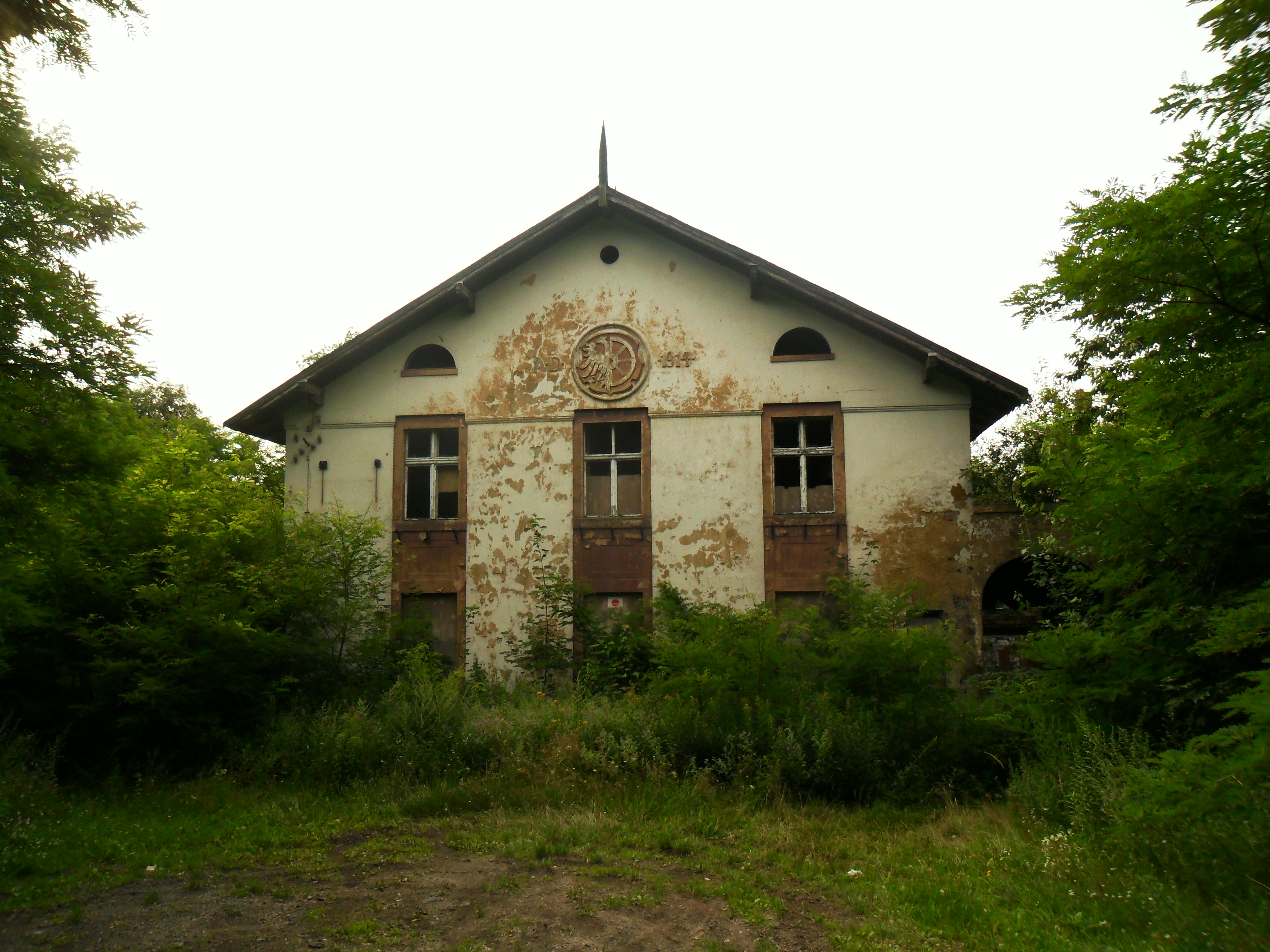 Dawna restauracja w lesie Widok w Raciborzu-Brzeziu